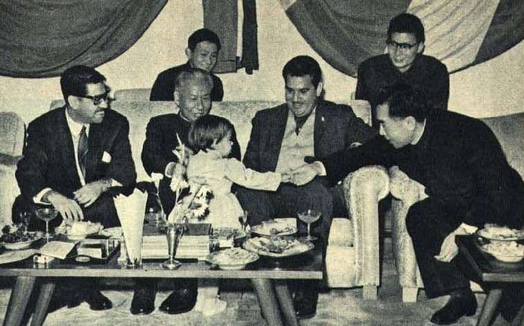 1962-03 1962年1月2日 古巴驻华大使奥斯卡·皮诺·桑托斯召开古巴三周年庆祝会